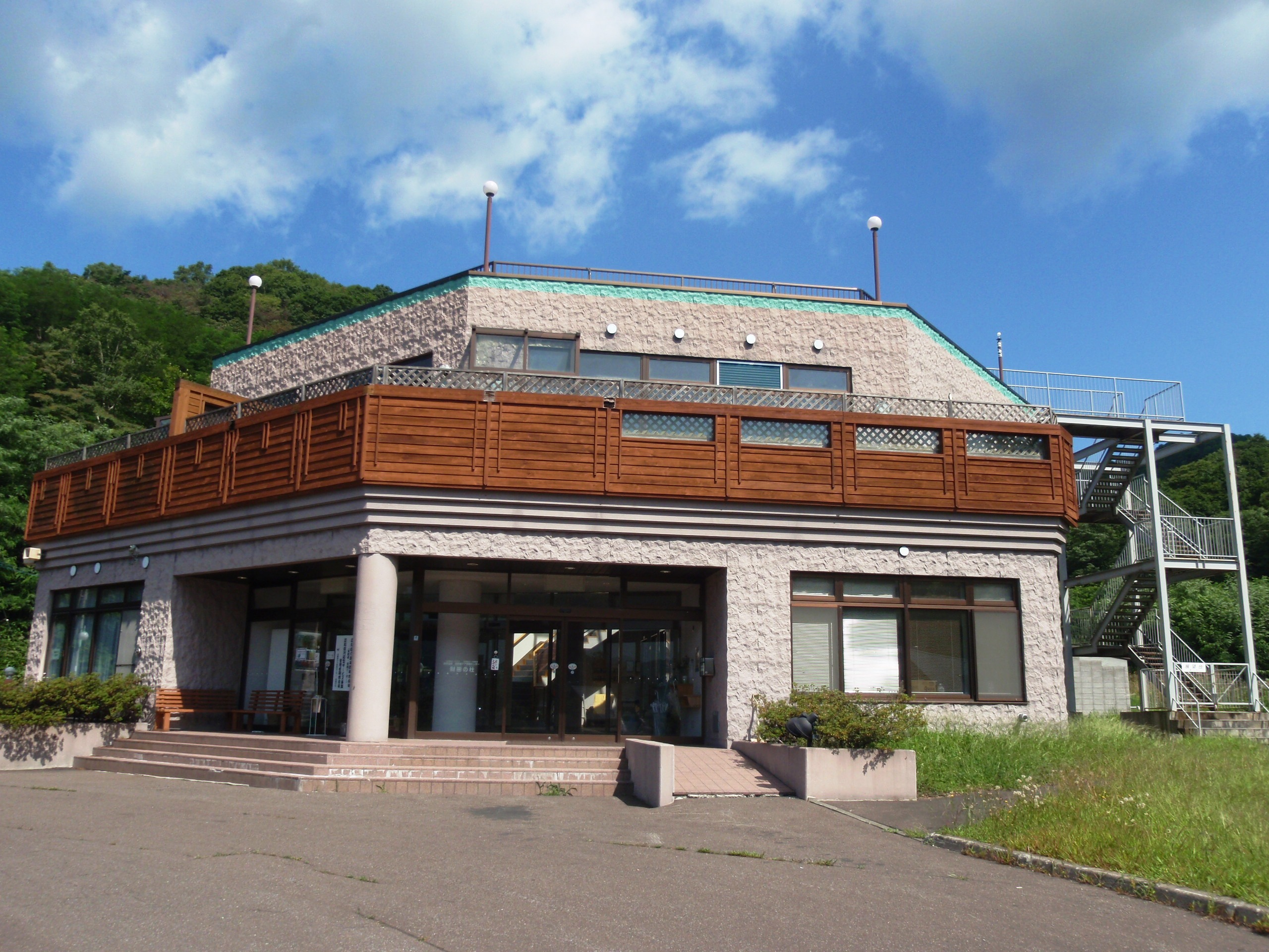 財田温泉、財田の杜。撮影時は廃業済み。